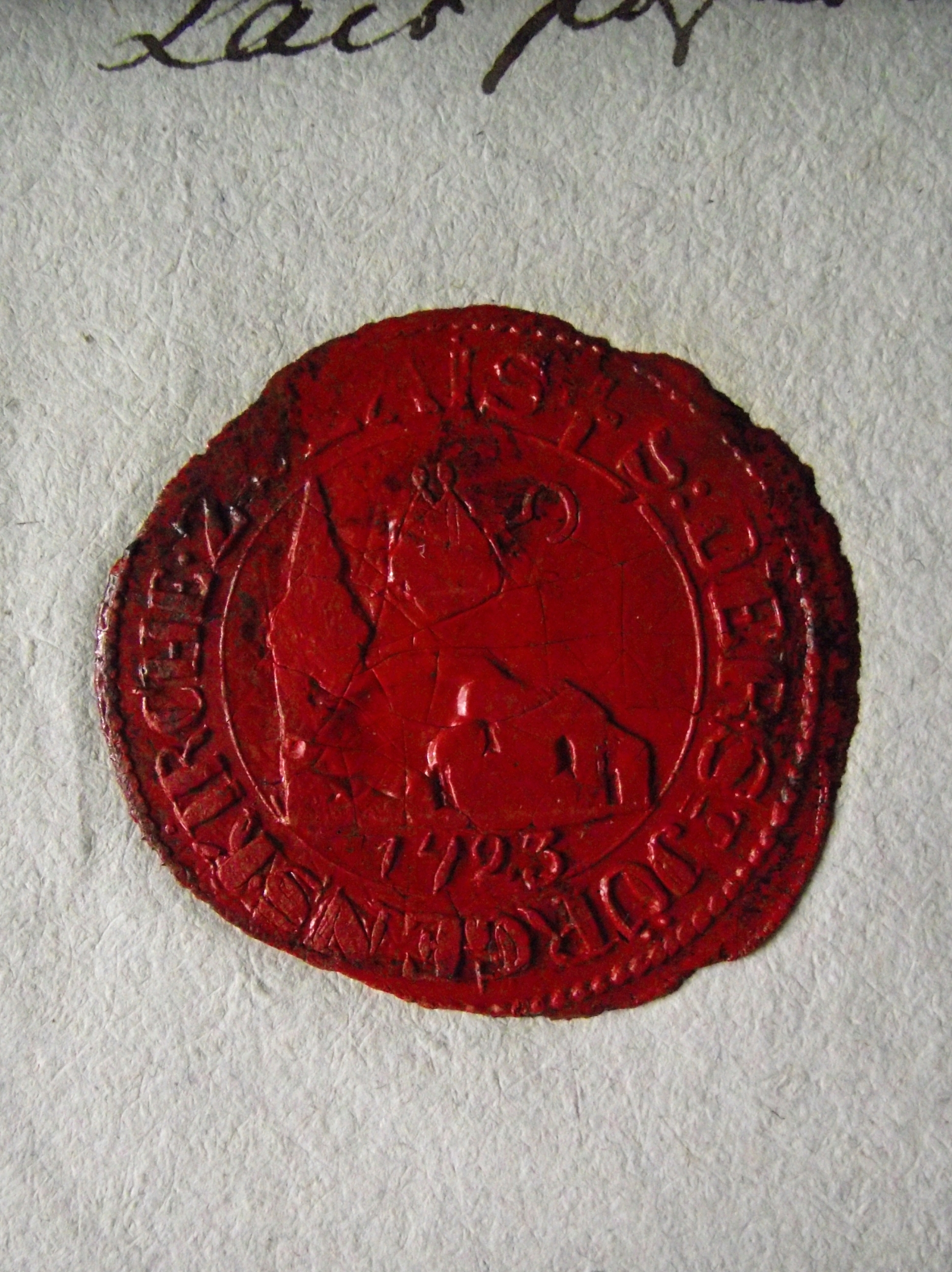 Laiuse koguduse pitser 1833. aastast